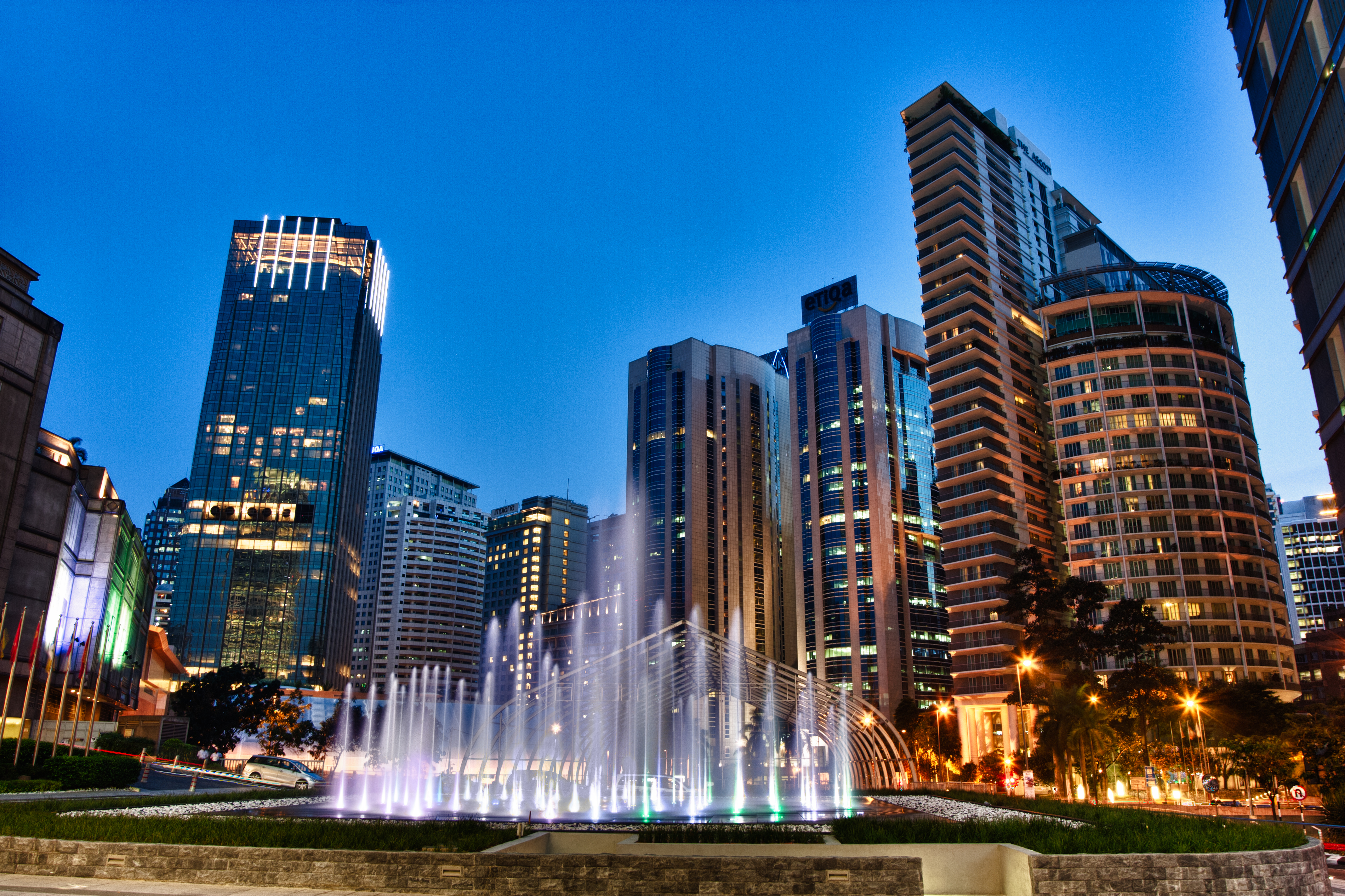 Kuala Lumpur City Centre (HDR). Malaysia, 2012.